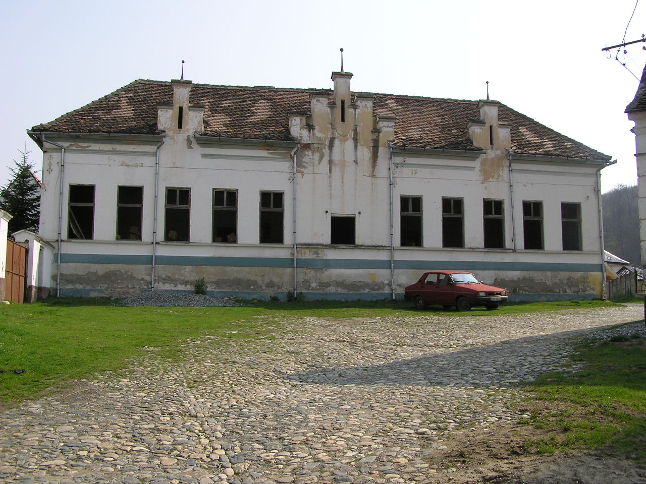 Gebäude neben der evangelischen Kirche von Tălmaciu (Talmesch), Siebenbürgen, Rumänien. deutsche Schule für Klassen 1-8